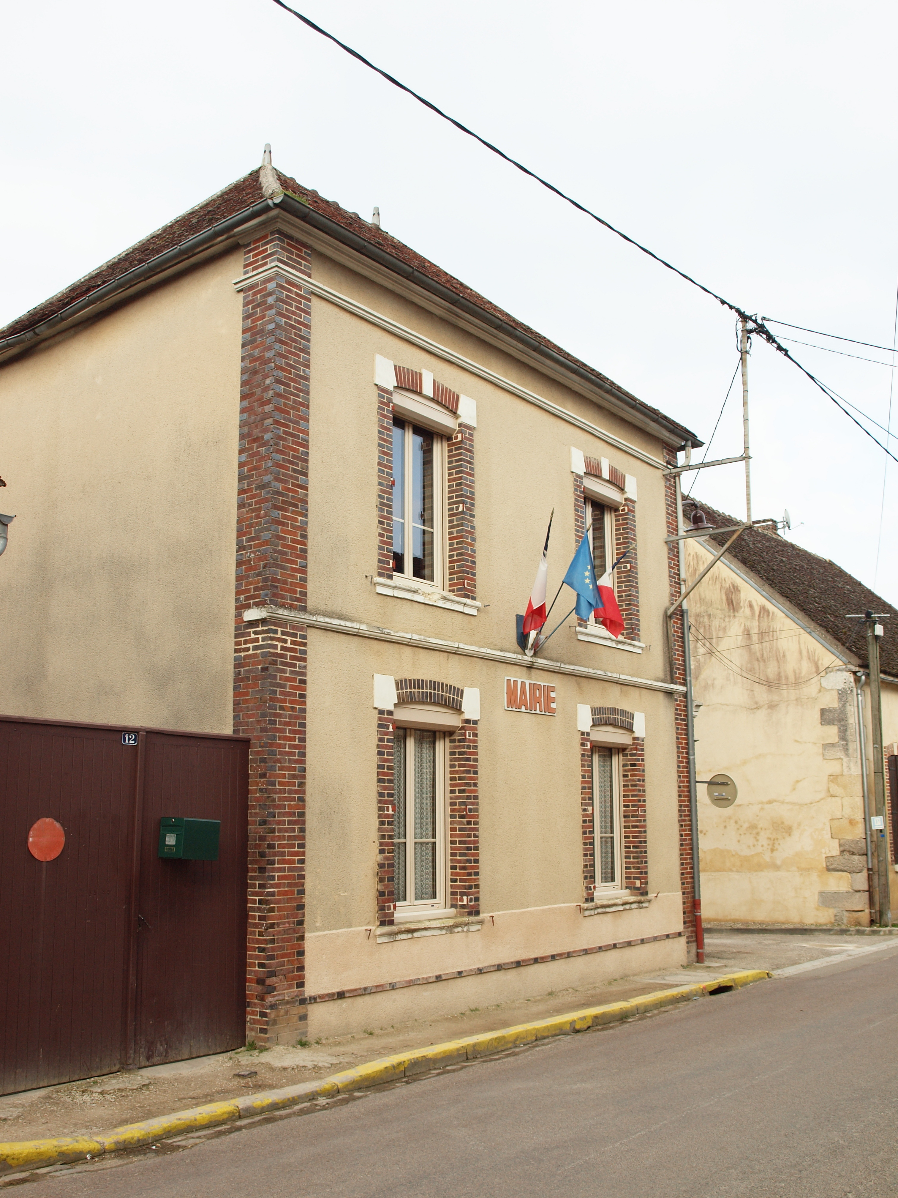 Épineau-les-Voves (Yonne, France)